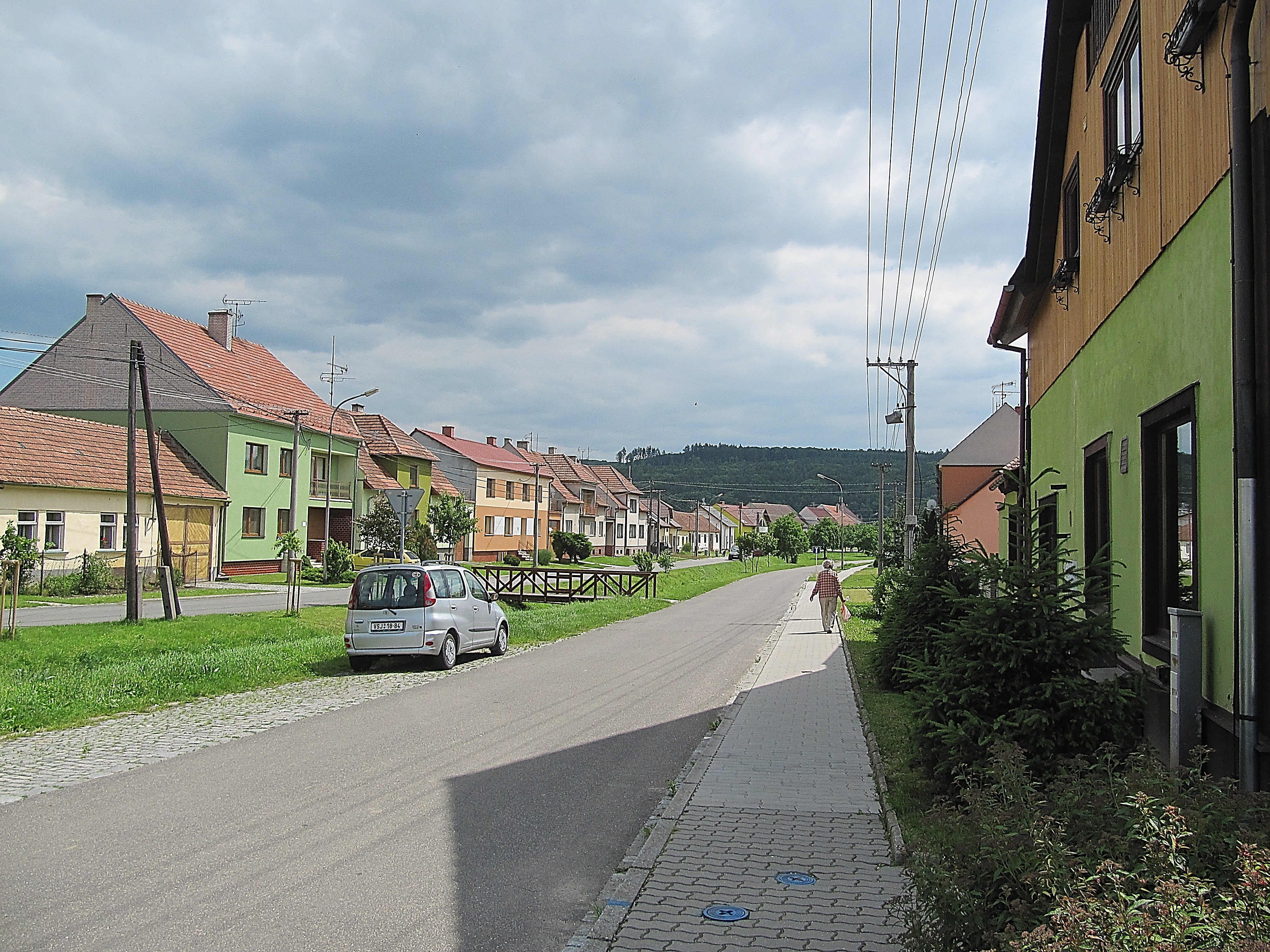 Hradčovice, okres Uherské Hradiště, ulice kolem potoka